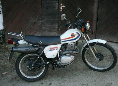 honda xl500 modell 1979